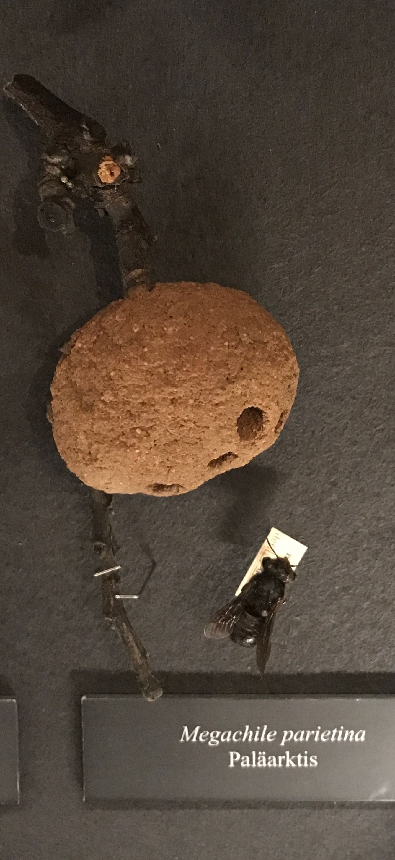 Präparat des Naturhistorischen Museums Wien Exhibit of the Museum of Natural History in Vienna